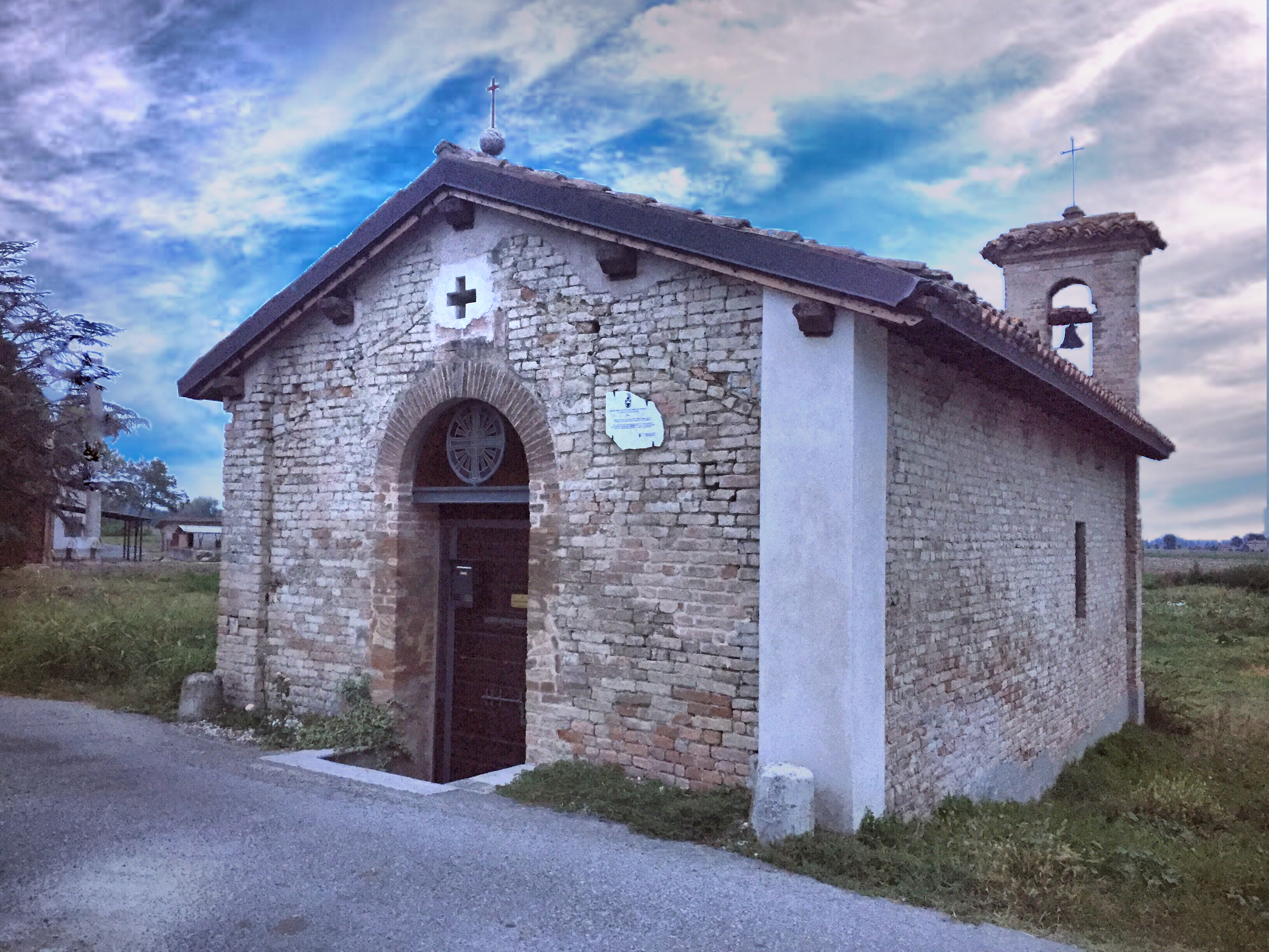 Chiesa diSanta Maria Maddalena (Fontanella)